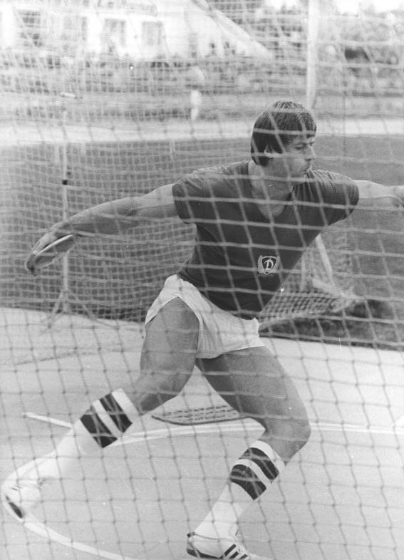 Wolfgang Schmidt ADN-ZB Reiche 12.08.1978-gt-Dresden: Beim Klubpokalfinale in der Leichtathletik in Dresden erzielte am 12.08.1978 der Berliner Dynamo-Sportler Wolfgang Schmidt mit 68,98 m ein hervorragendes Resultat.